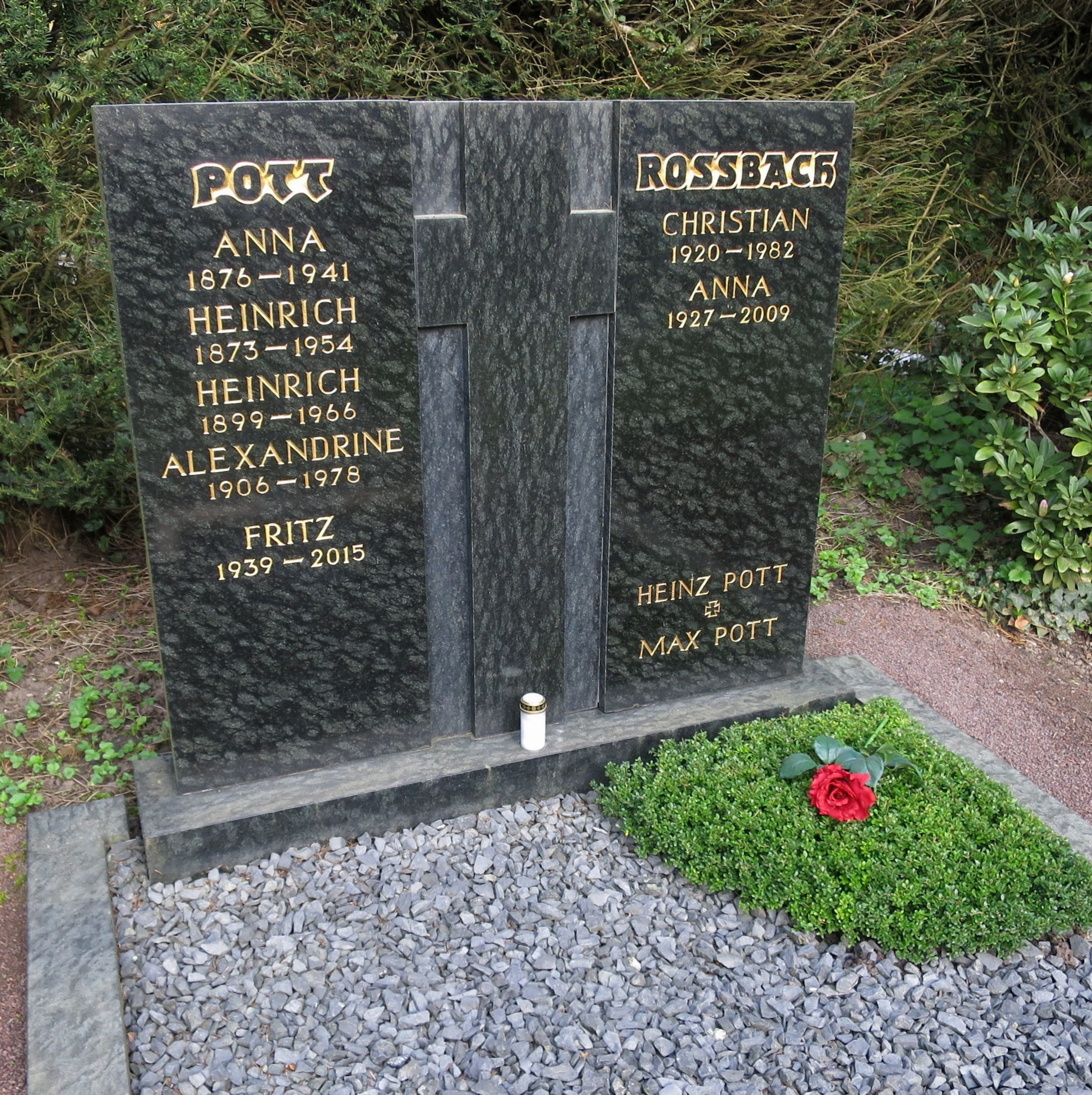 Fritz Pott - Grab auf Kölner Südfriedhof